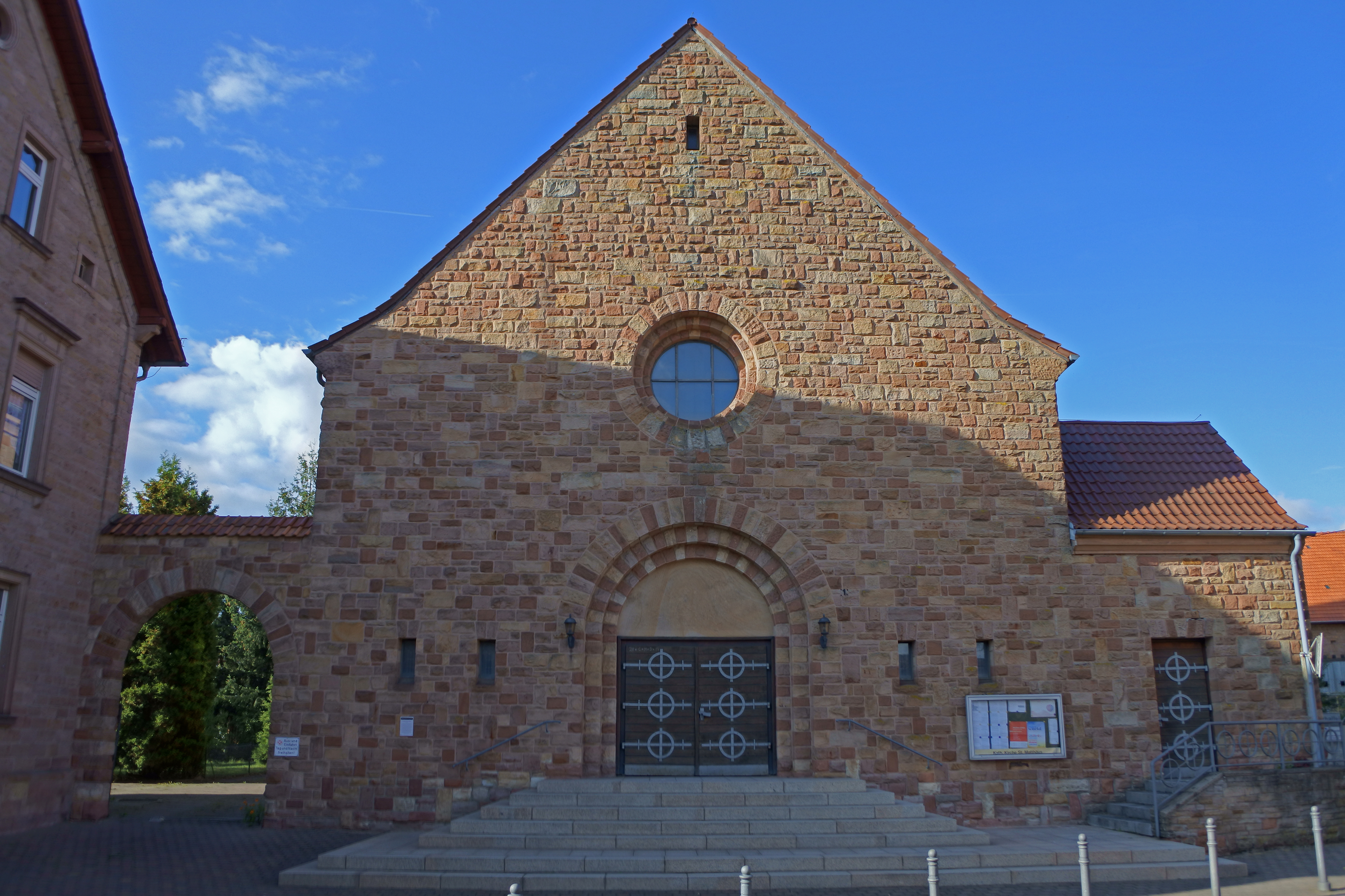 katholische Kirche "St. Matthäus", romanisierender Saalbau, 1935/36, Architekten Albert Boßlet, Würzburg/Landau und Karl Lochner, Ludwigshafen; straßen- und ortsbildprägend, Kriegsfeld